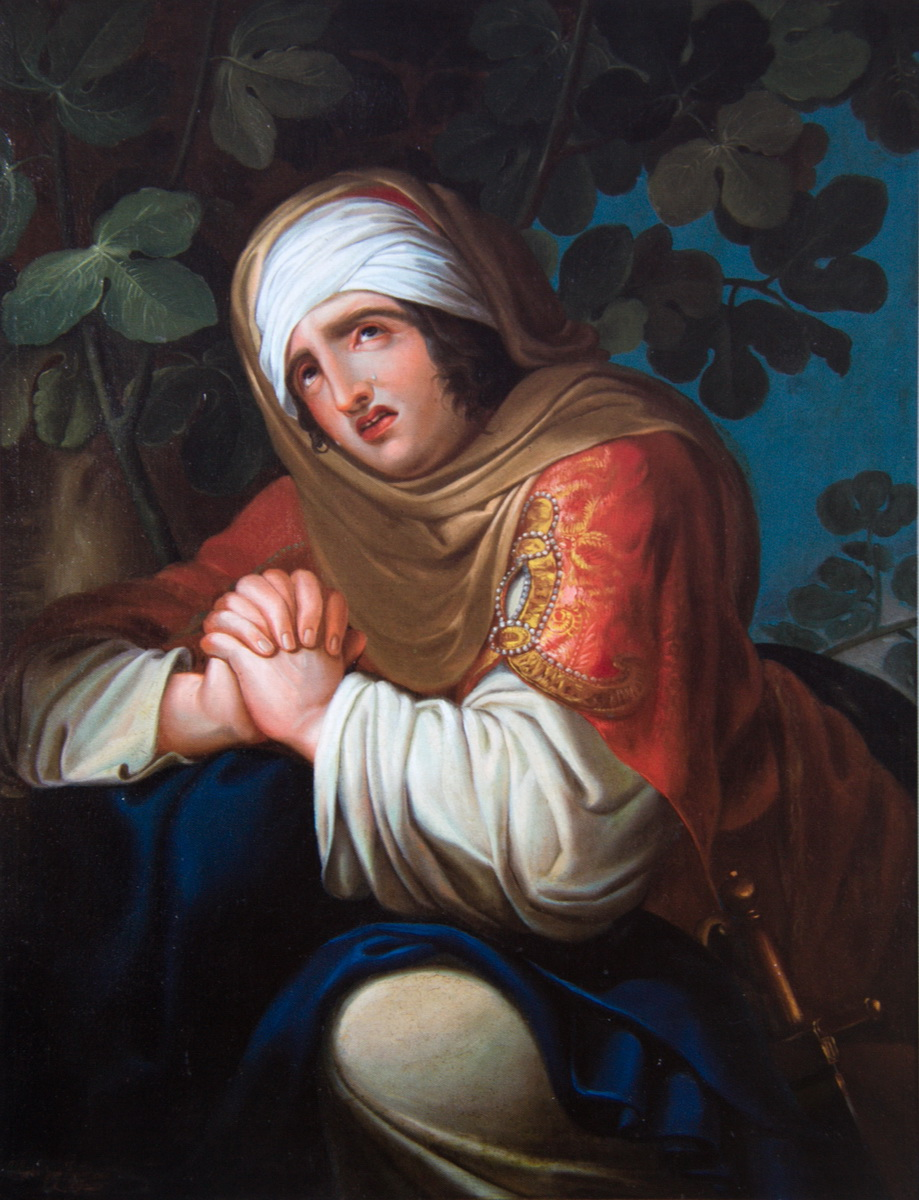 Obra de Josep Tapiró i Baró del període de formació (1853)